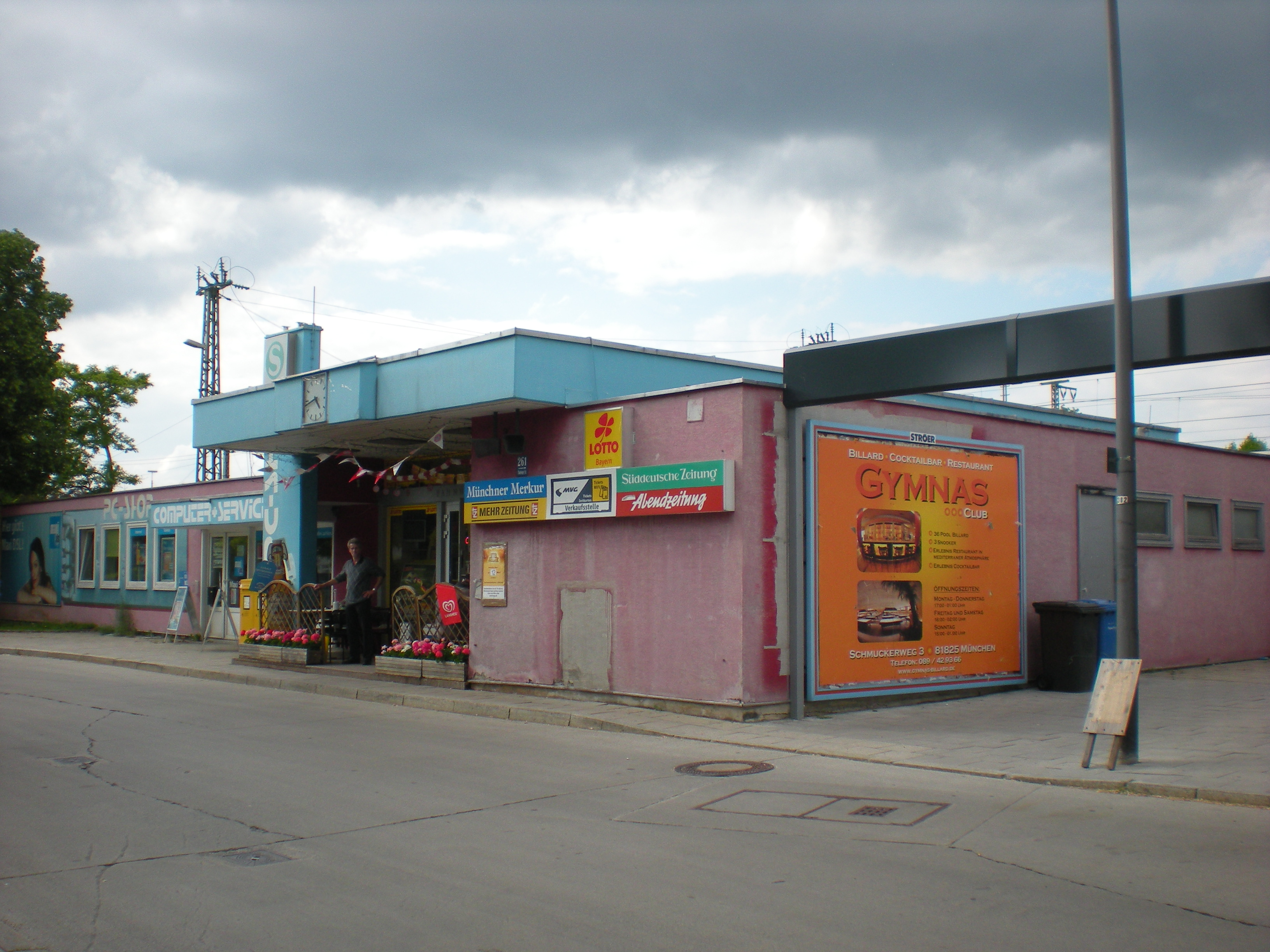 Ehemaliges Bahnhofsgebäude (heute Kiosk) des S-Bahnhofs München-Trudering